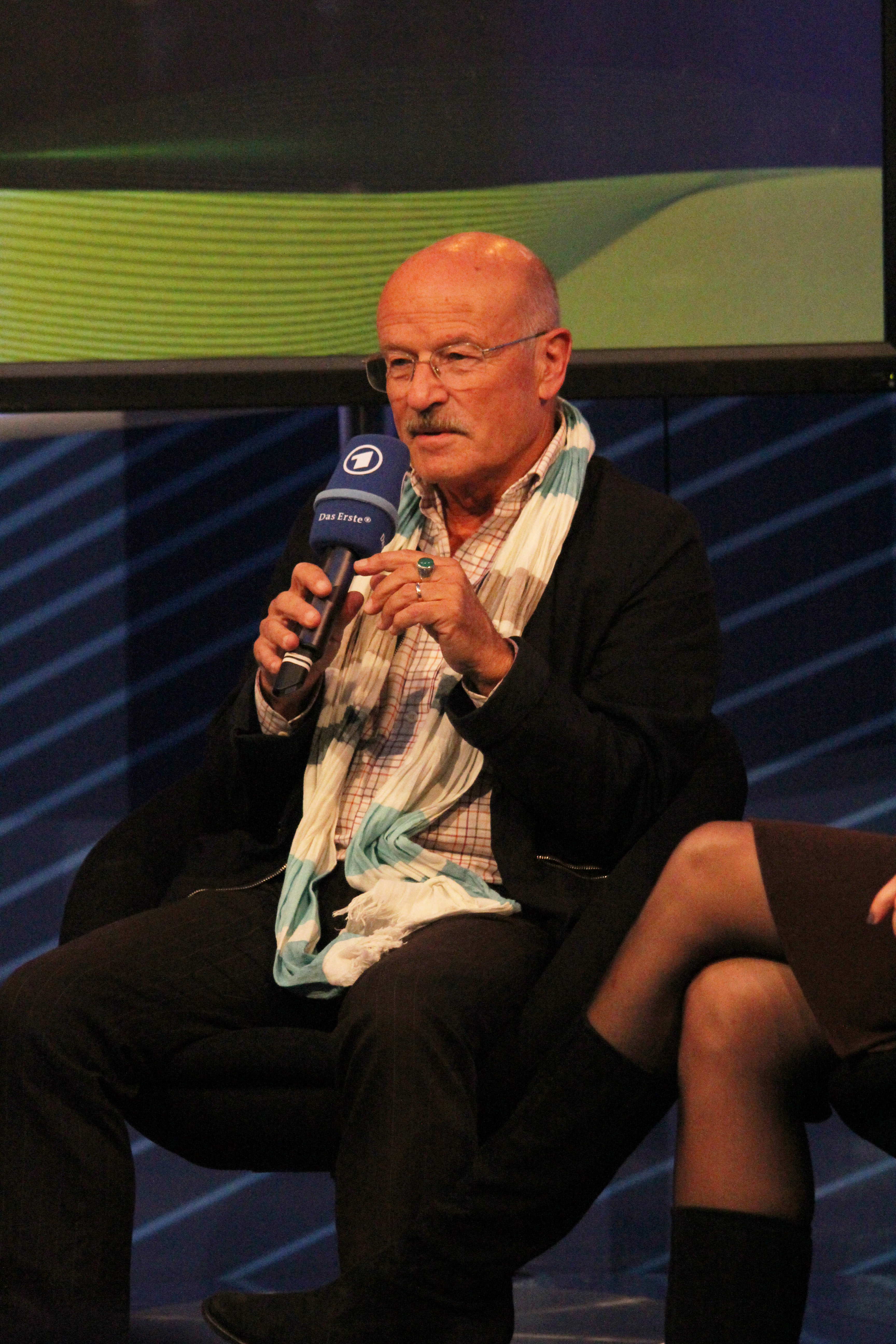 Volker Schlöndorff auf der Frankfurter Buchmesse 2011